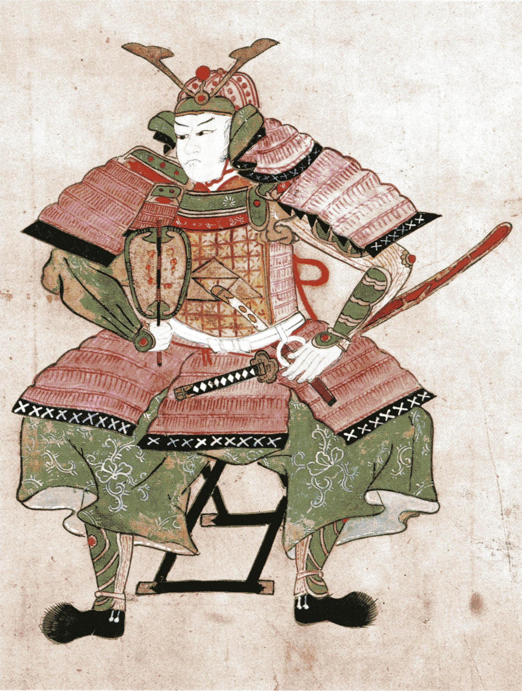 北条仲時画像